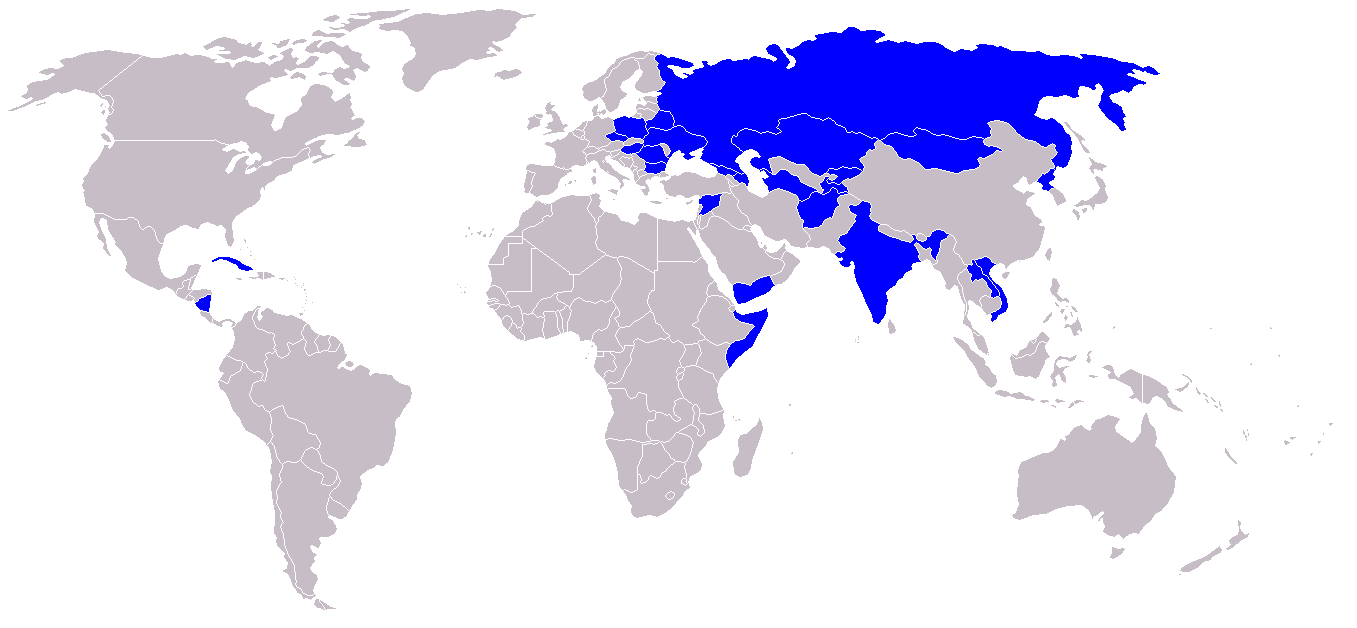 Die 25 Mitgliedsstaaten von Intersputnik, einer 1971 in Moskau gegründeten internationalen Satellitenorganisation, die Satelliten und Transponder betreibt.